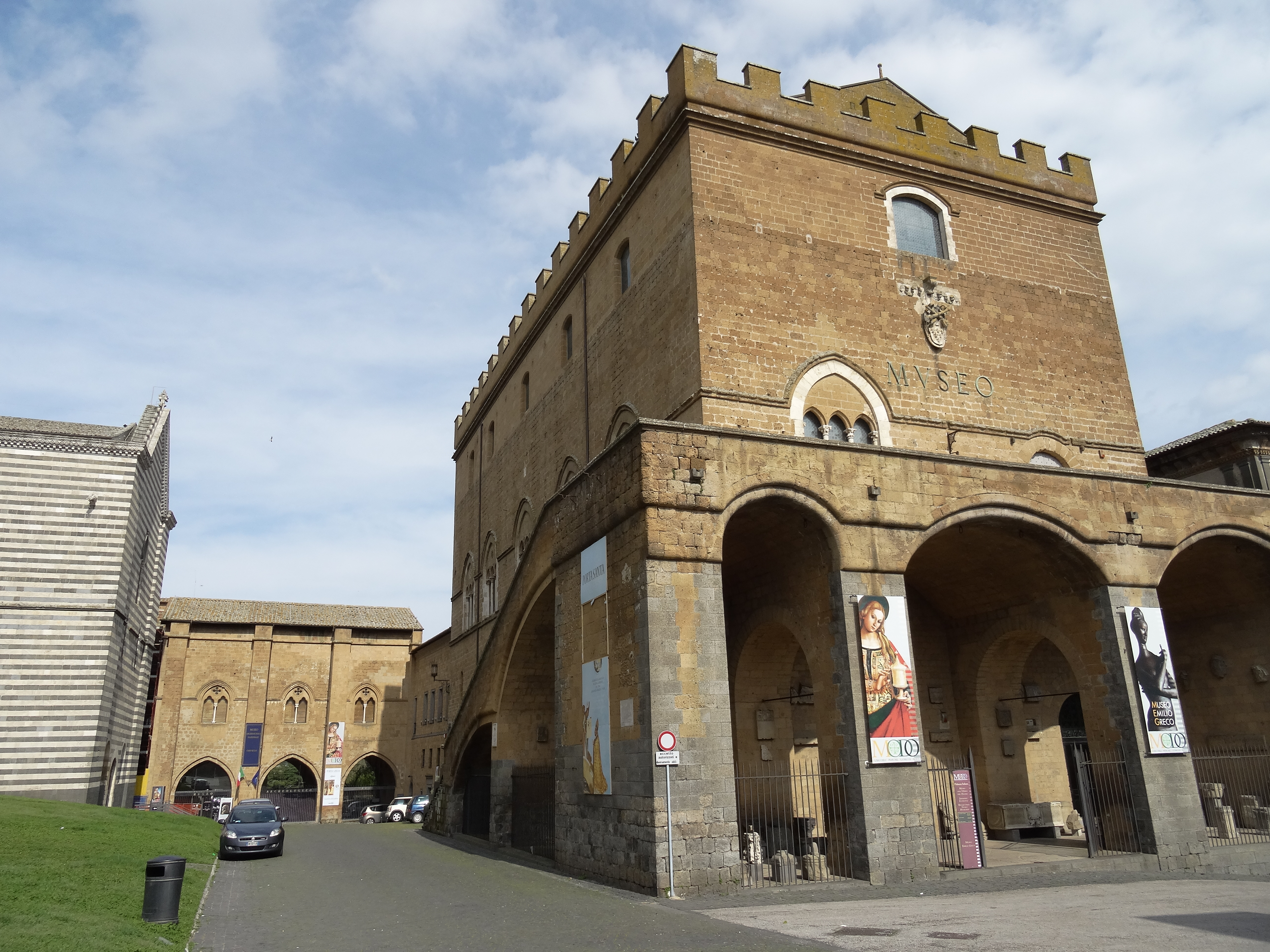 Orvieto